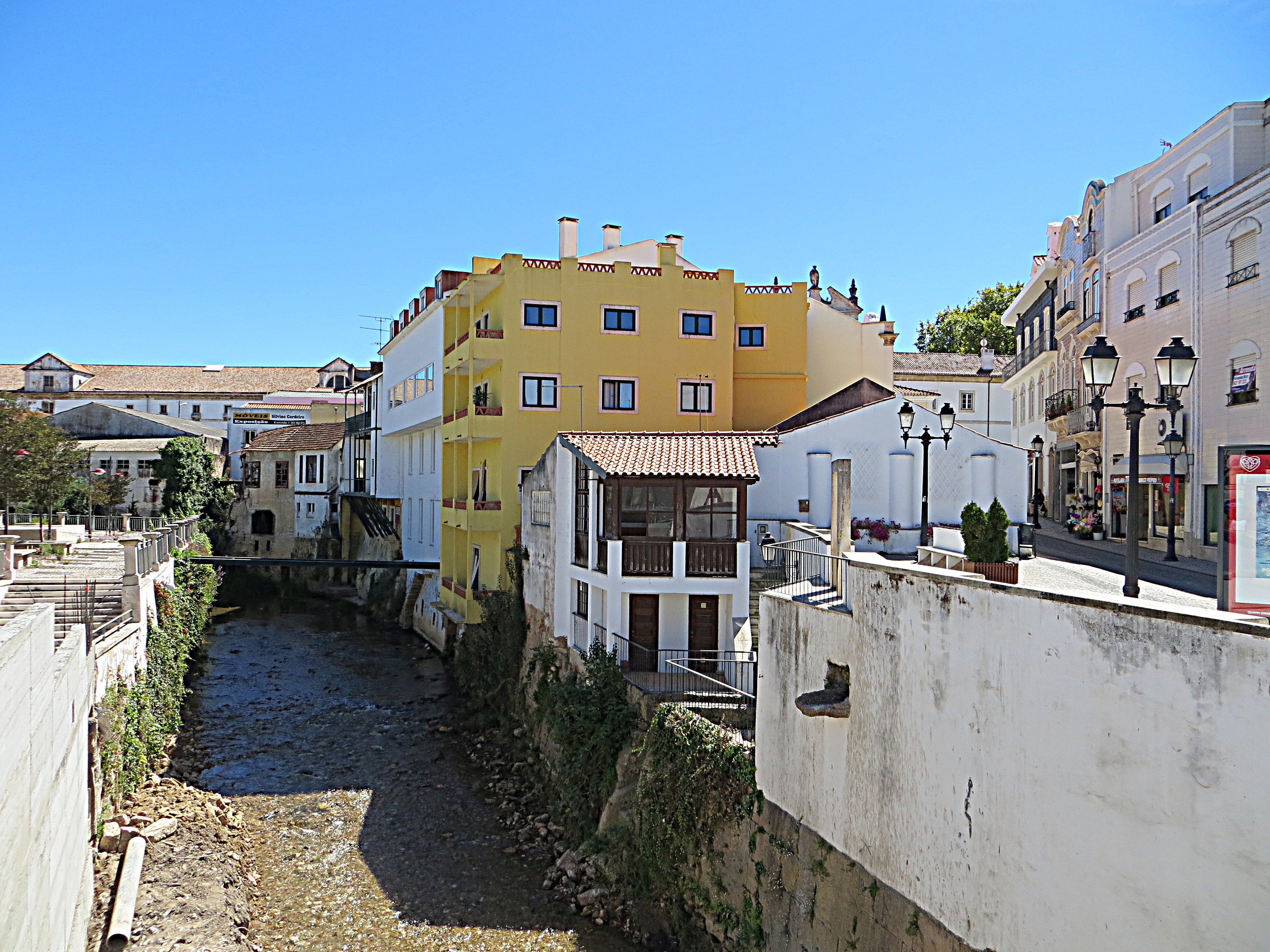 Rio Alcobaca